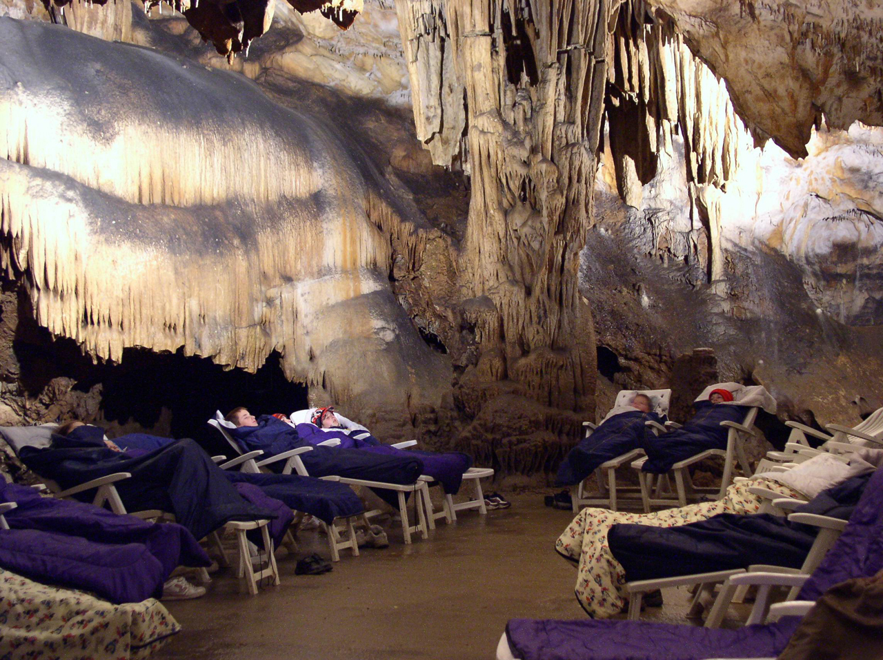 Speleoterapia v Kúpeloch Štós